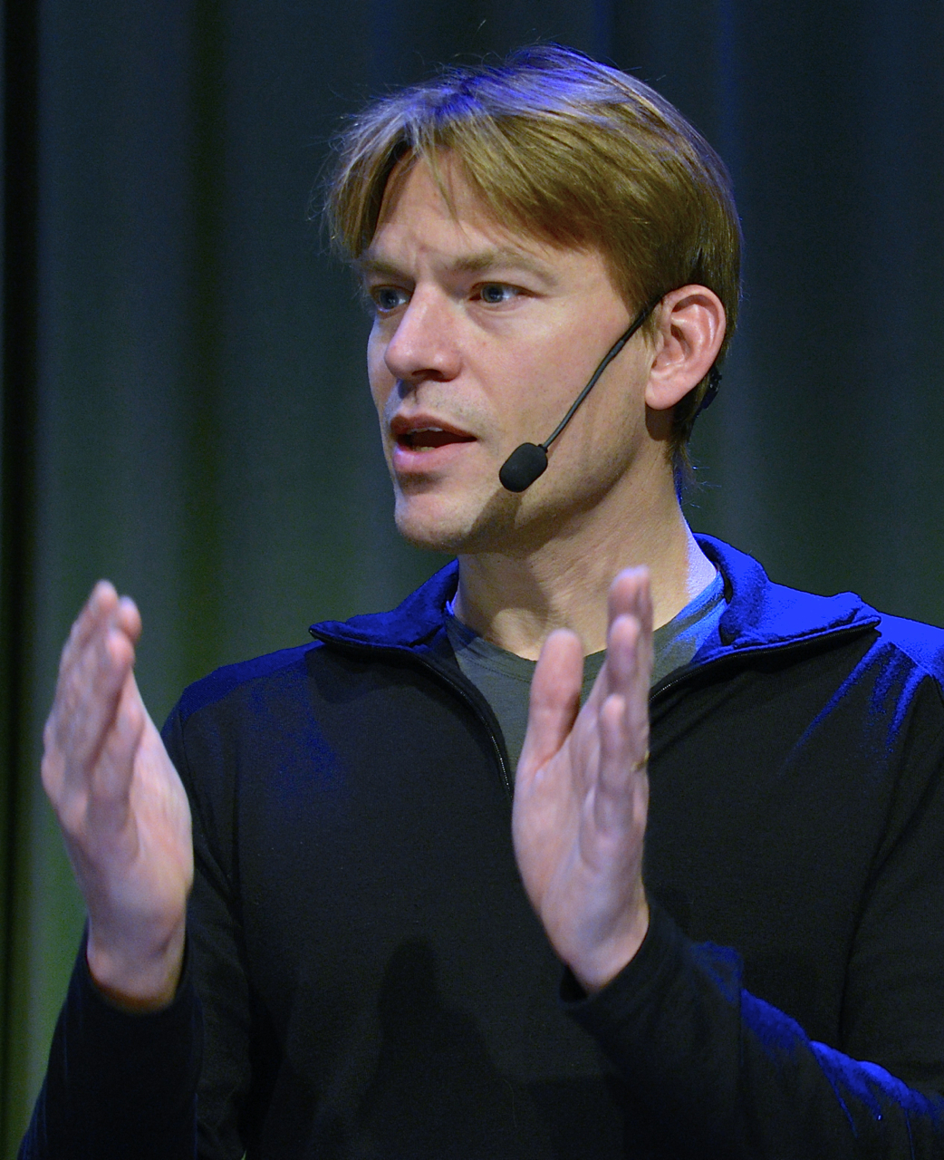 PM Nilsson i en debatt om flyktingmottagande och migrationspolitik på Kulturhuset Stadsteatern den 10 december 2014.